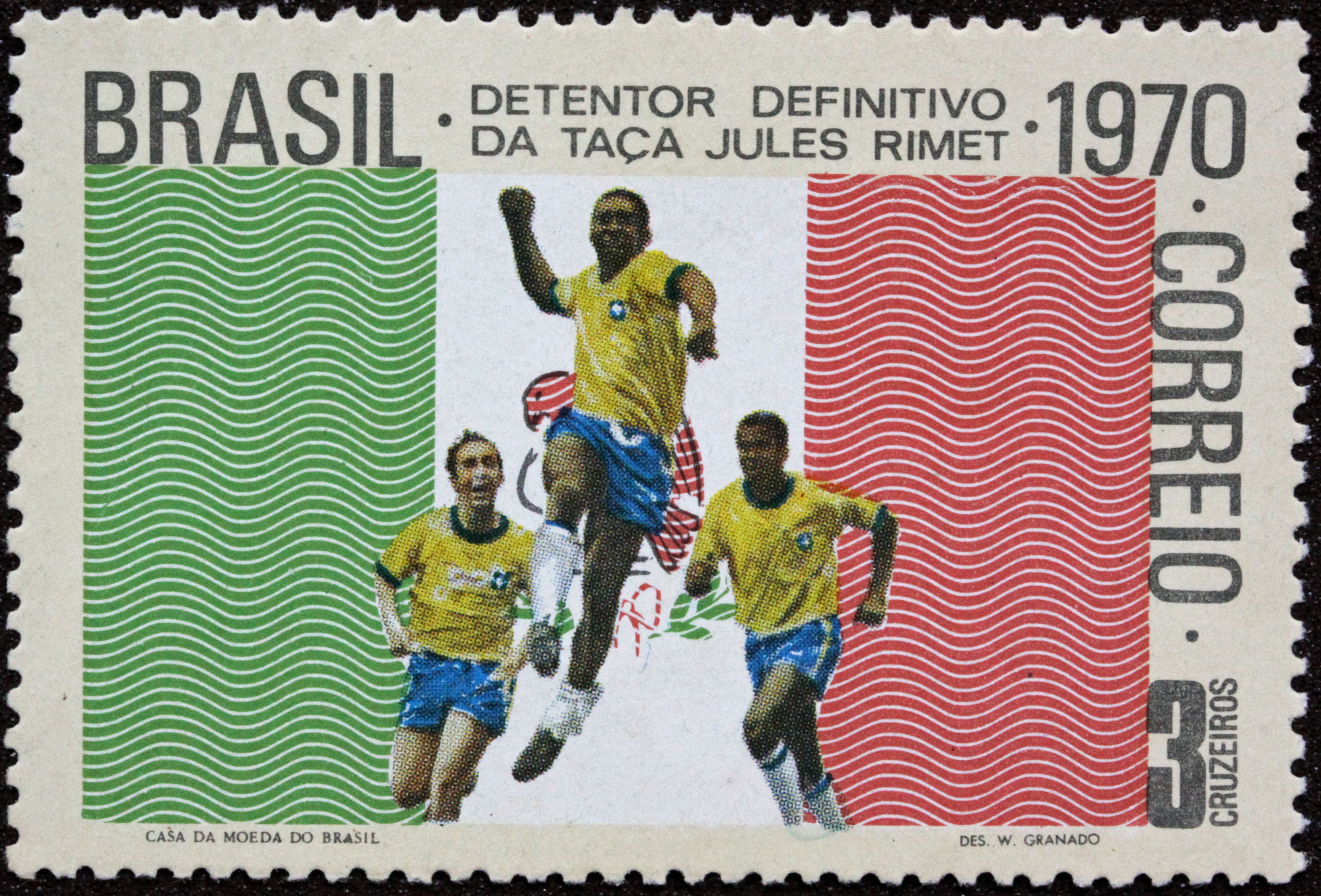 Selo Comemorativo do Campeonato Mundial de Futebol de 1970 (Copa do Mundo de 70).